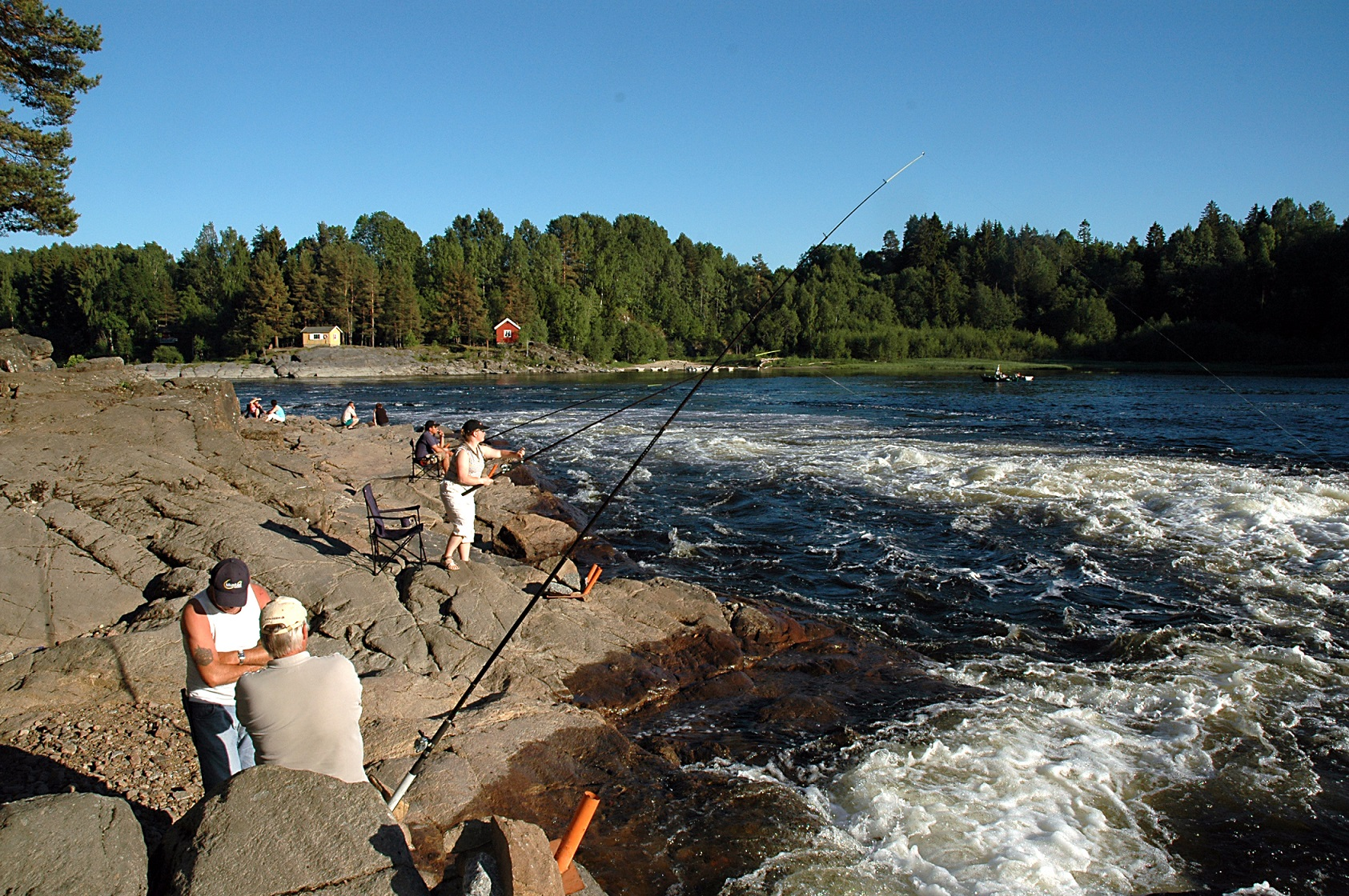 pecheurs sur rivière